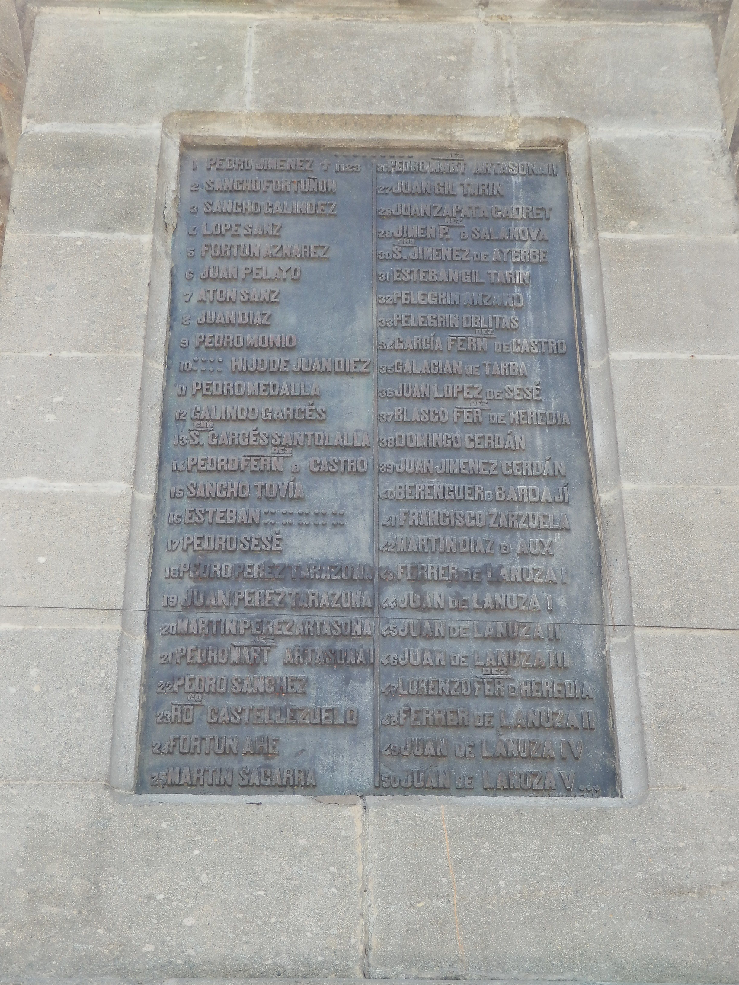 Monumento al Justiciazgo Estatua de Don Juan V de Lanuza, Justicia Mayor de Aragón ajusticiado en 1591 por orden de Felipe II. Listado de 50 Justicias de Aragón.